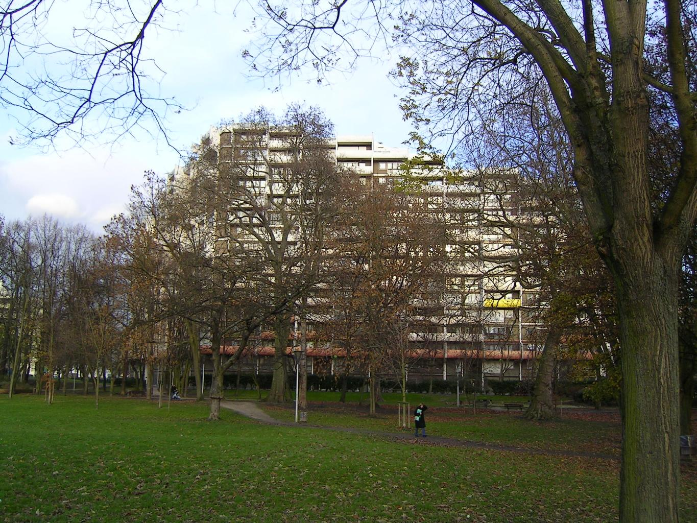 Sevran (Seine-Saint-Denis) - Résidence Isabelle Décembre 2006 Photo personnelle (own work) de Marianna